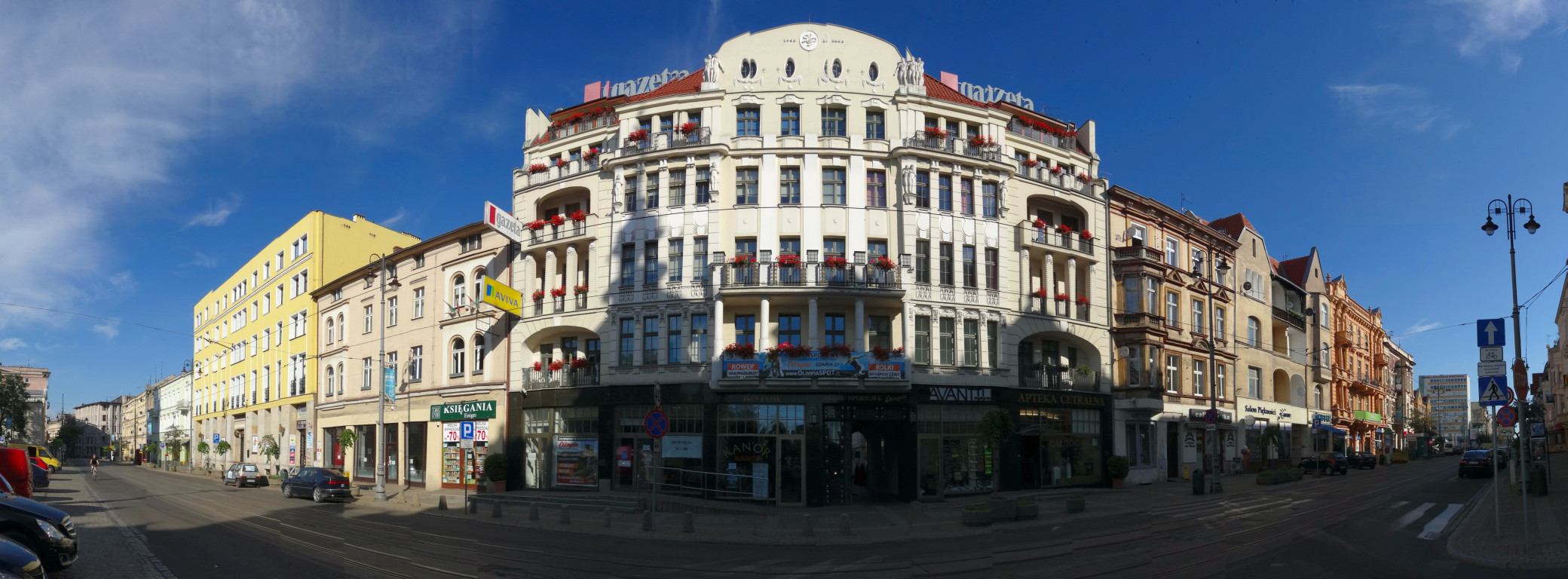 Ulica Gdańska w Bydgoszczy